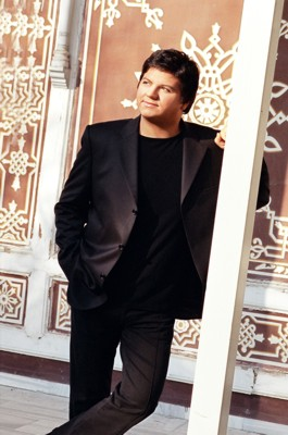 Turkish-Belgian singer Kubat